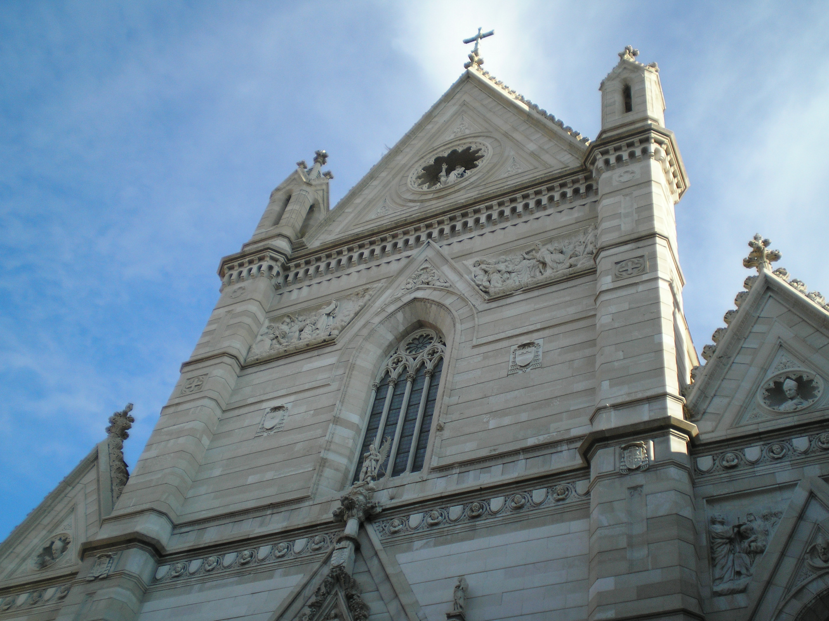 duomo di Napoli (foto di Peppe Pepe di Angri)